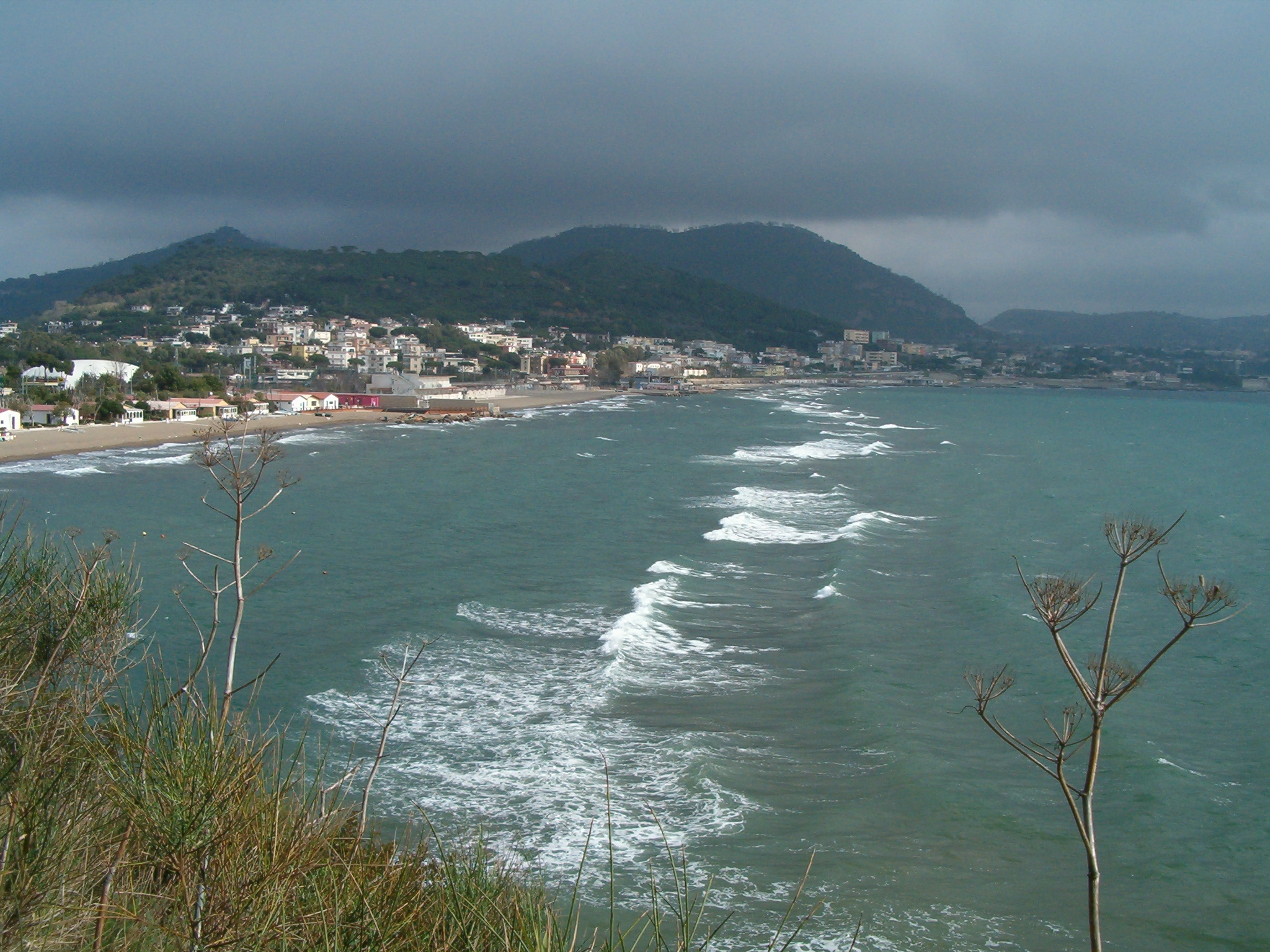 Golfo di Pozzuoli, Portus Julius visto da Punta Epitaffio - Il tracciato dell'antica strada romana via Herculea, che correva sull'istmo che separava l'antico Lago di Lucrino / Portus Julius dal mare, oggi sommersa per effetto del bradisismo, è riconoscibile nei giorni di mareggiata in quanto che, trattandosi di un bassofondale, le onde vi si infrangono di sopra. La curvatura in fondo è dovuta all'interruzione della strada per la presenza dell'antico canale di ingresso nel lago. Sullo sfondo il basso vulcano del Monte Nuovo, ricoperto di pini, ed alle sue spalle l'alto massiccio tufaceo del Monte Gauro.